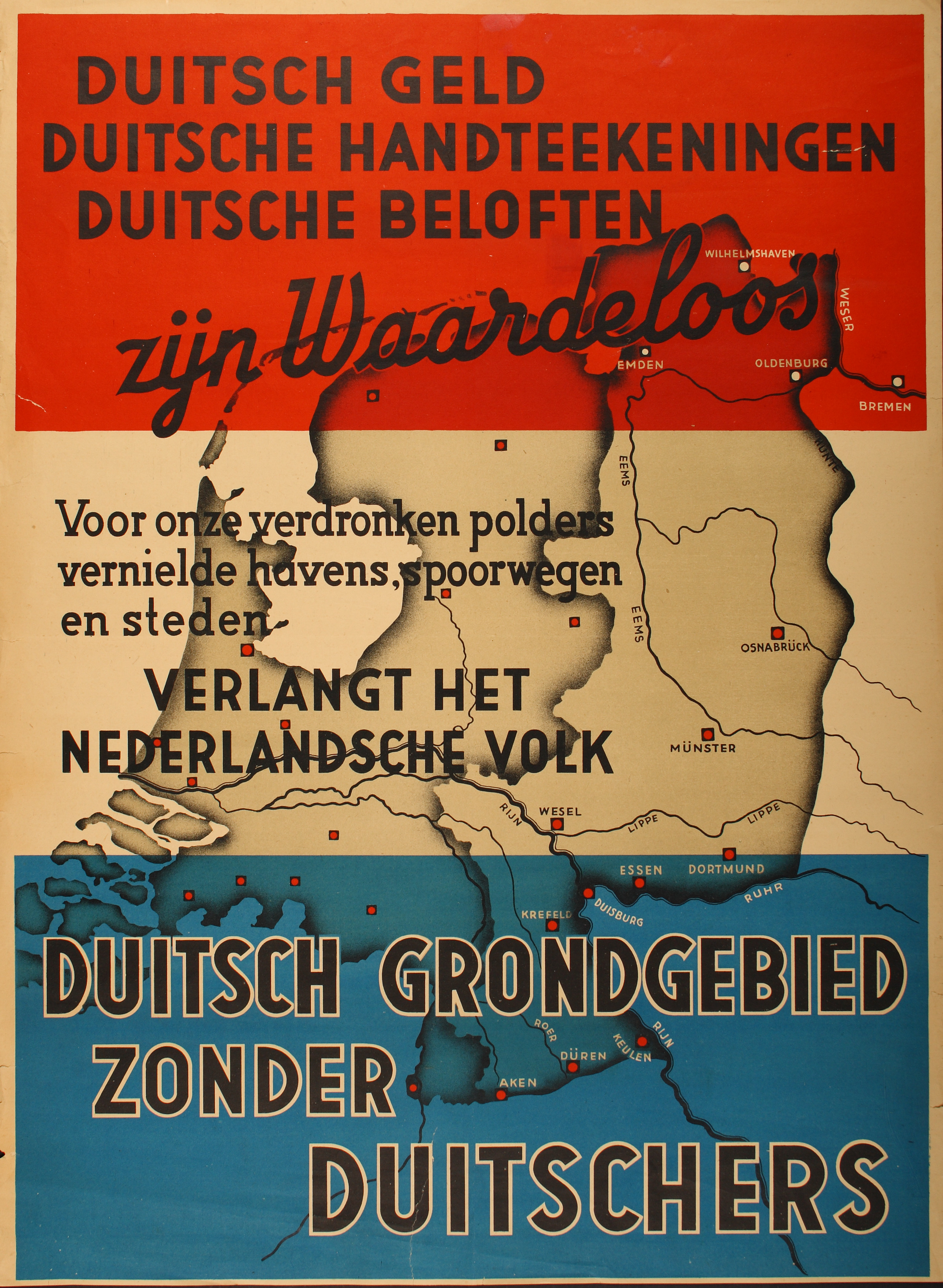 Duitsch geld, -handteekingen, -beloften Een affiche van Nederland. De achtergrond is rood wit blauw gekleurd. Erop te zien is een landkaart van Nederland met de oostgrens tot aan Wilhelmshaven - Oldenburg - Osnabrueck - Dortmund - Essen - Duisburg - Keulen - Dueren en Aken. Dit aanplakbiljet is een roep om schadeherstel, de tekst luidt: 'Duitsch geld, Duitsche Handteekeningen, Duitsche beloften zijn waardeloos voor onze verdronken polders, vernielde havens, spoorwegen en steden verlangt het Nederlandsche volk Duitsch grondgebied zonder Duitschers'.